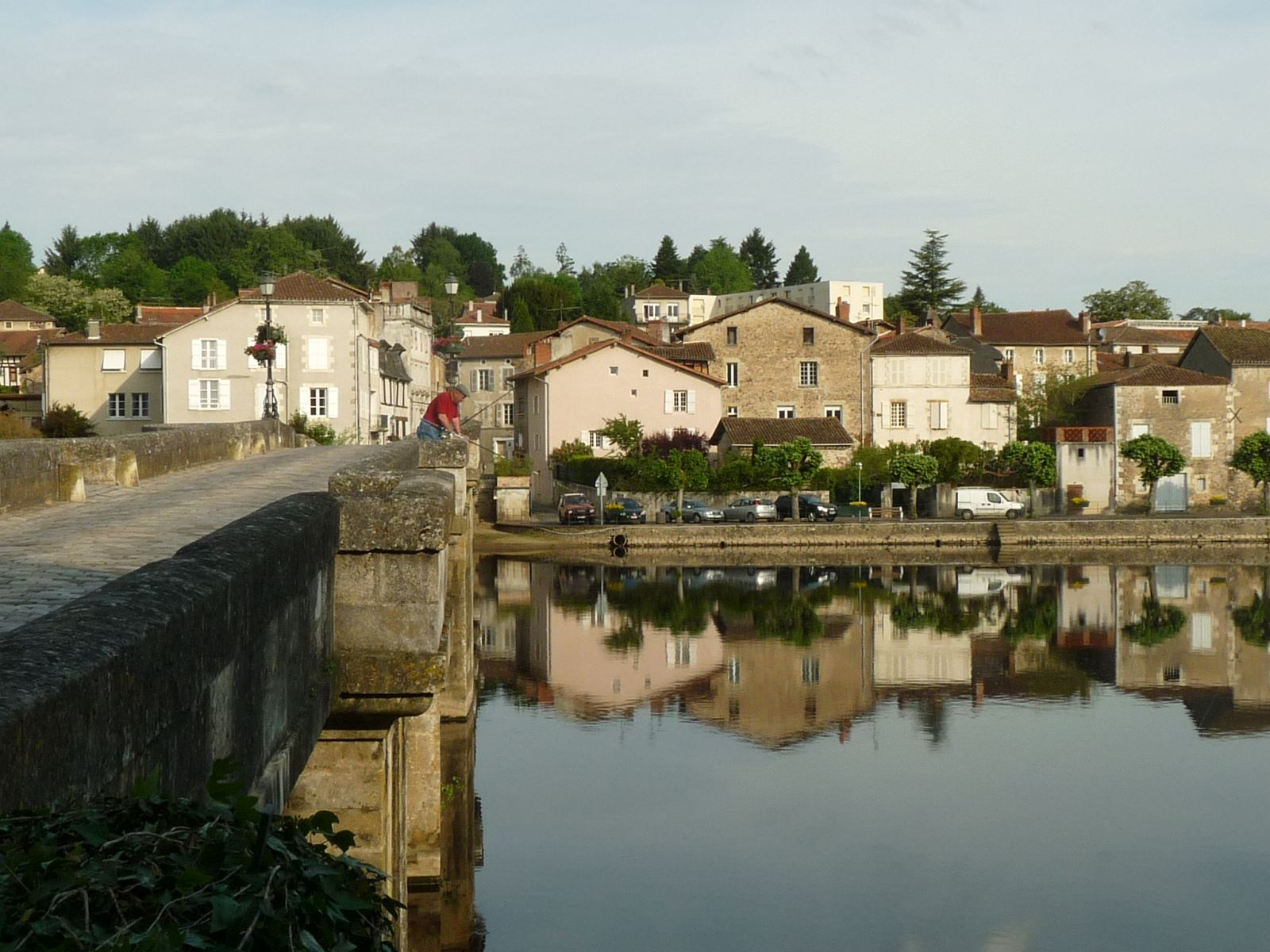 Pont-Vieux, Confolens (Charente, France)